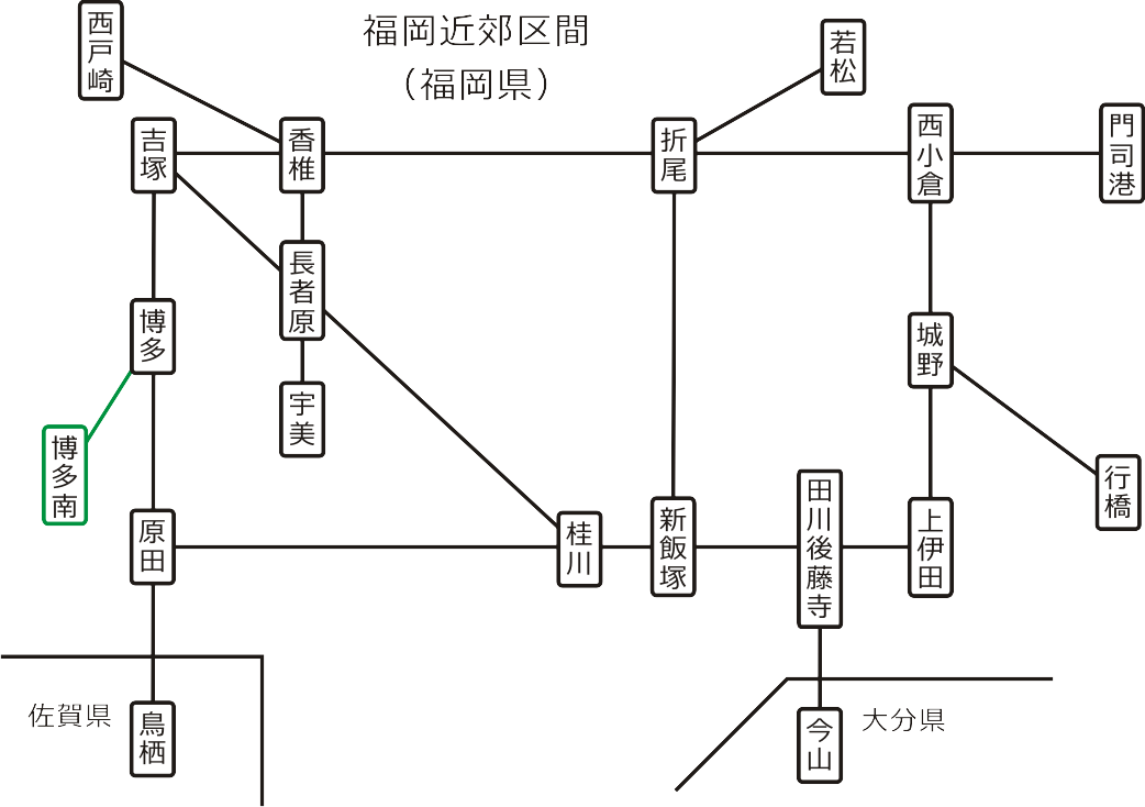 Route Map of Fukuoka Suburban Area